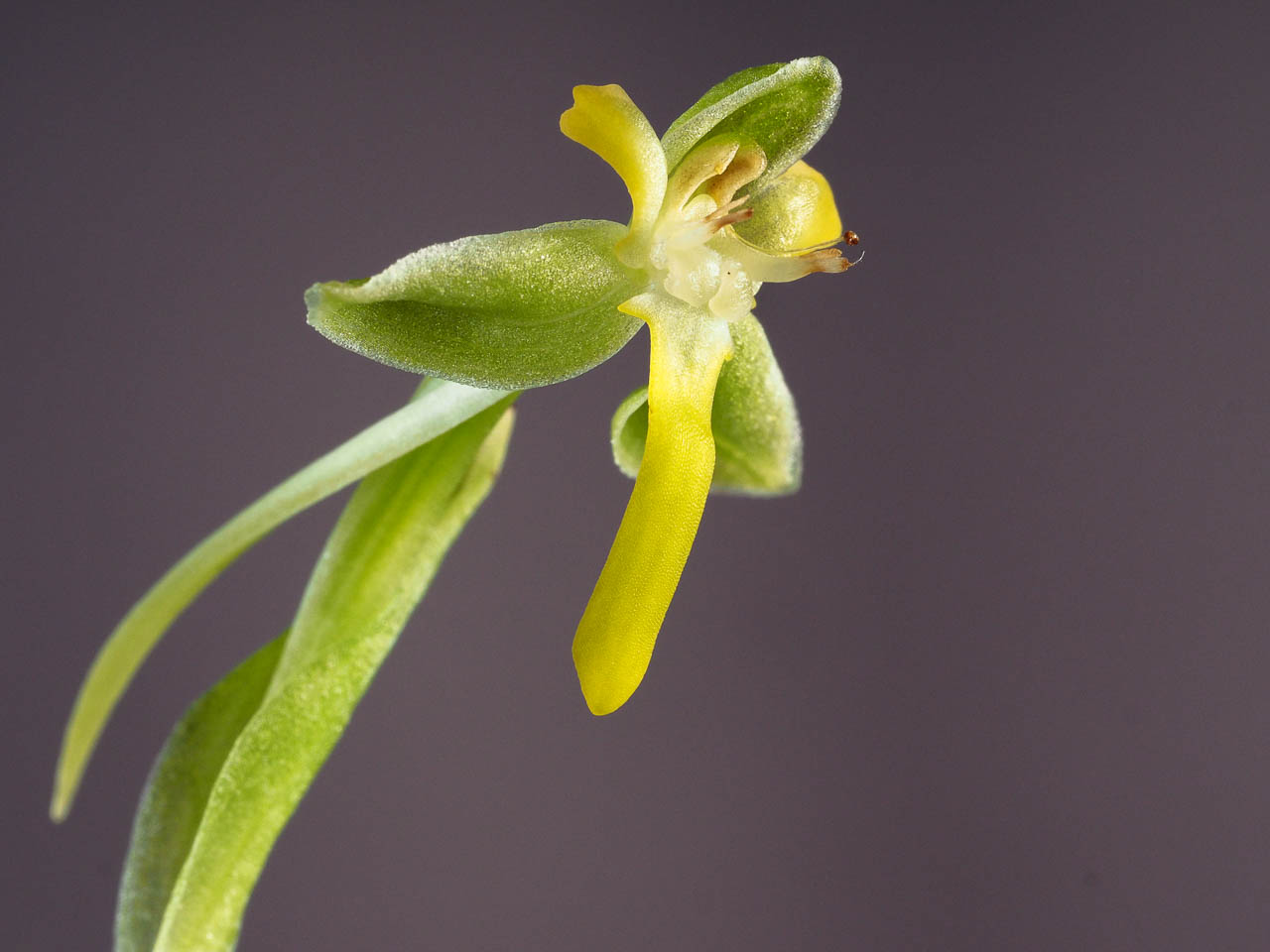 Habenaria floribunda